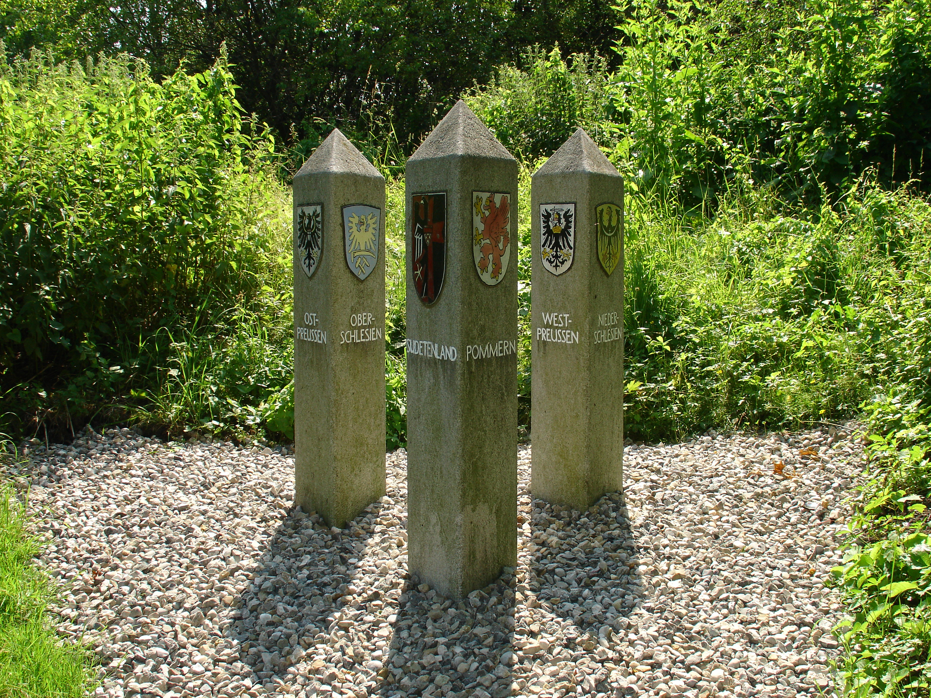 Stelen mit den Wappen von Ostpreußen, Westpreußen, Sudetenland, Oberschlesien, Niederschlesien und Pommern in Puchheim, Ecke Birkenstraße/Bürgermeister-Ertl-Straße im Ortsteil Puchheim-Bahnhof.